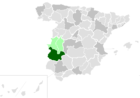 Territorio de la diócesis de Mérida-Badajoz, mapa